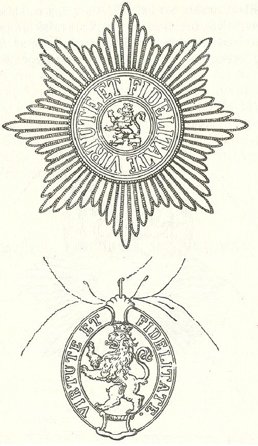 Scan van Blz. 318 van het boek "Handbuch der Ritter- und Verdienstorden " uitgegeven 1893 door Weber.Tekening van de in 1902 overleden Maximilian Gritzner. Robert Prummel 10 jul 2008 16:40 (CEST)